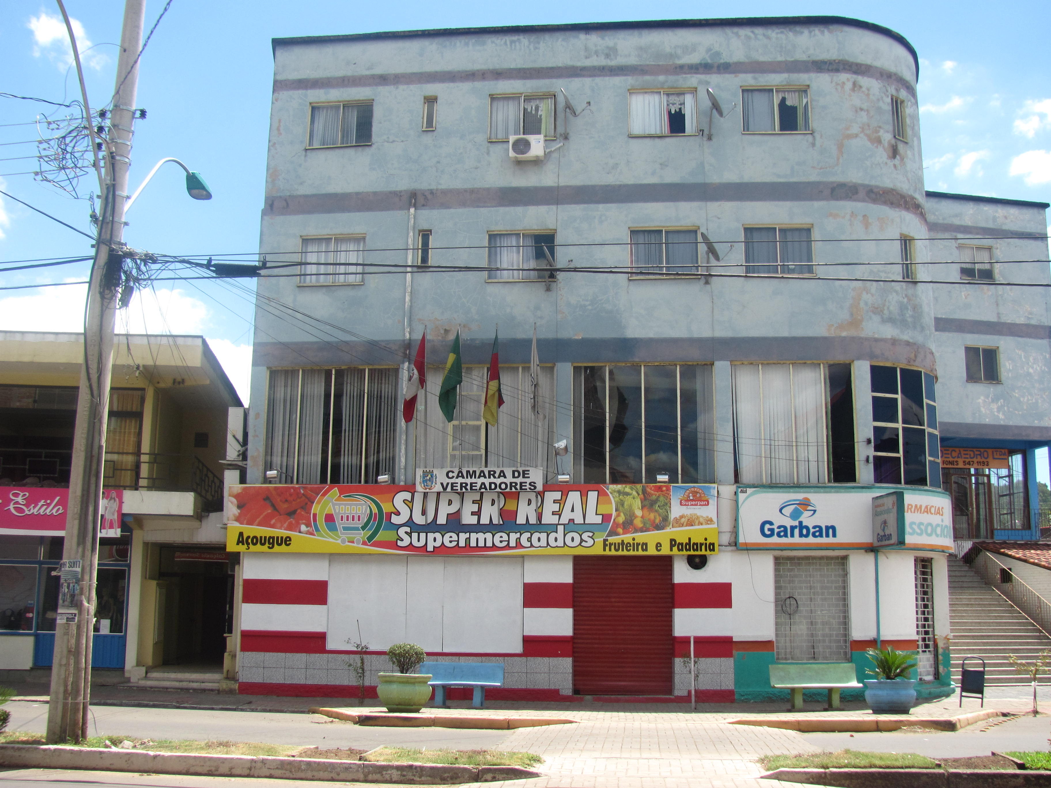 Câmara de vereadores de Rolante